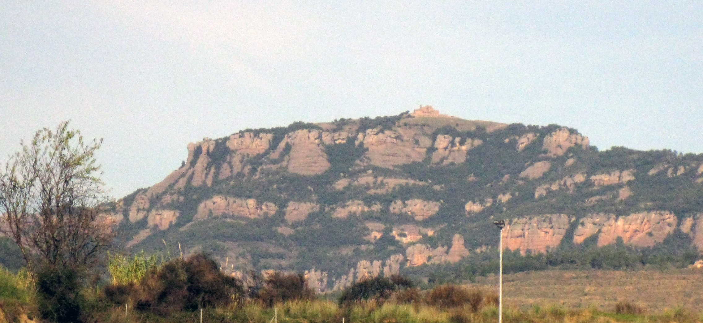 Sant Llorenç del Munt des de Can Boada (Terrassa).